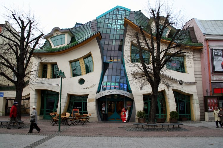 Сопотский "Танцующий дом".